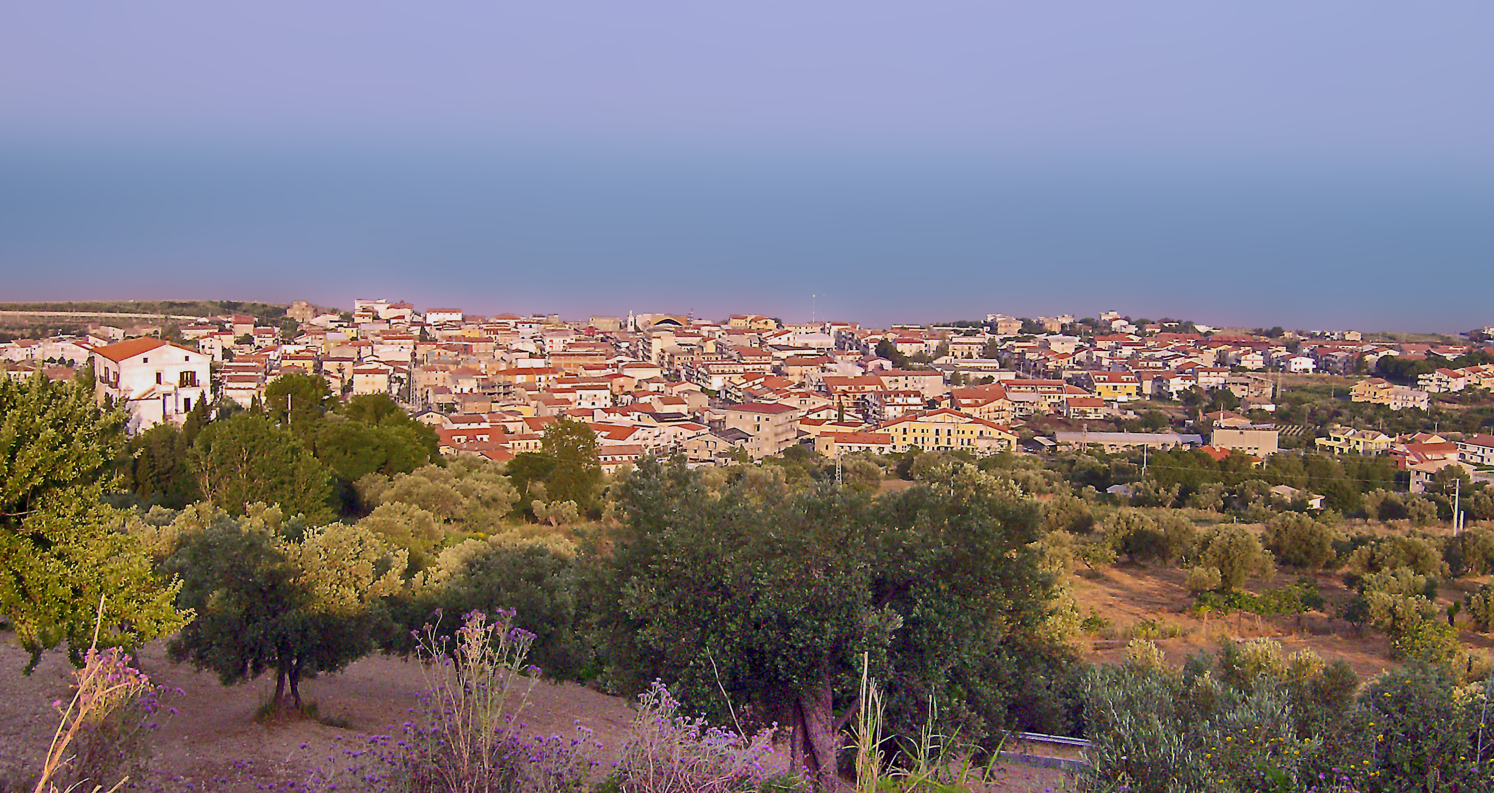 Io Luigi Salvatore Vadacchino, noto come Lodewijk Vadacchino. Cedo a Wikimedia Italia, la foto in questione HPIMd0567.jpg di mia proprietà, ritraente il Panomarama all'alba della mia cittadina, sotto licenza GFDL E CC-BY-SA, stto il nome di Campora san Giovanni 09 Panaorama Sunrise.jpg. distinntissimi saluti--Lodewijk Vadacchino (talk) 23:06, 1 June 2009 (UTC)CEST)